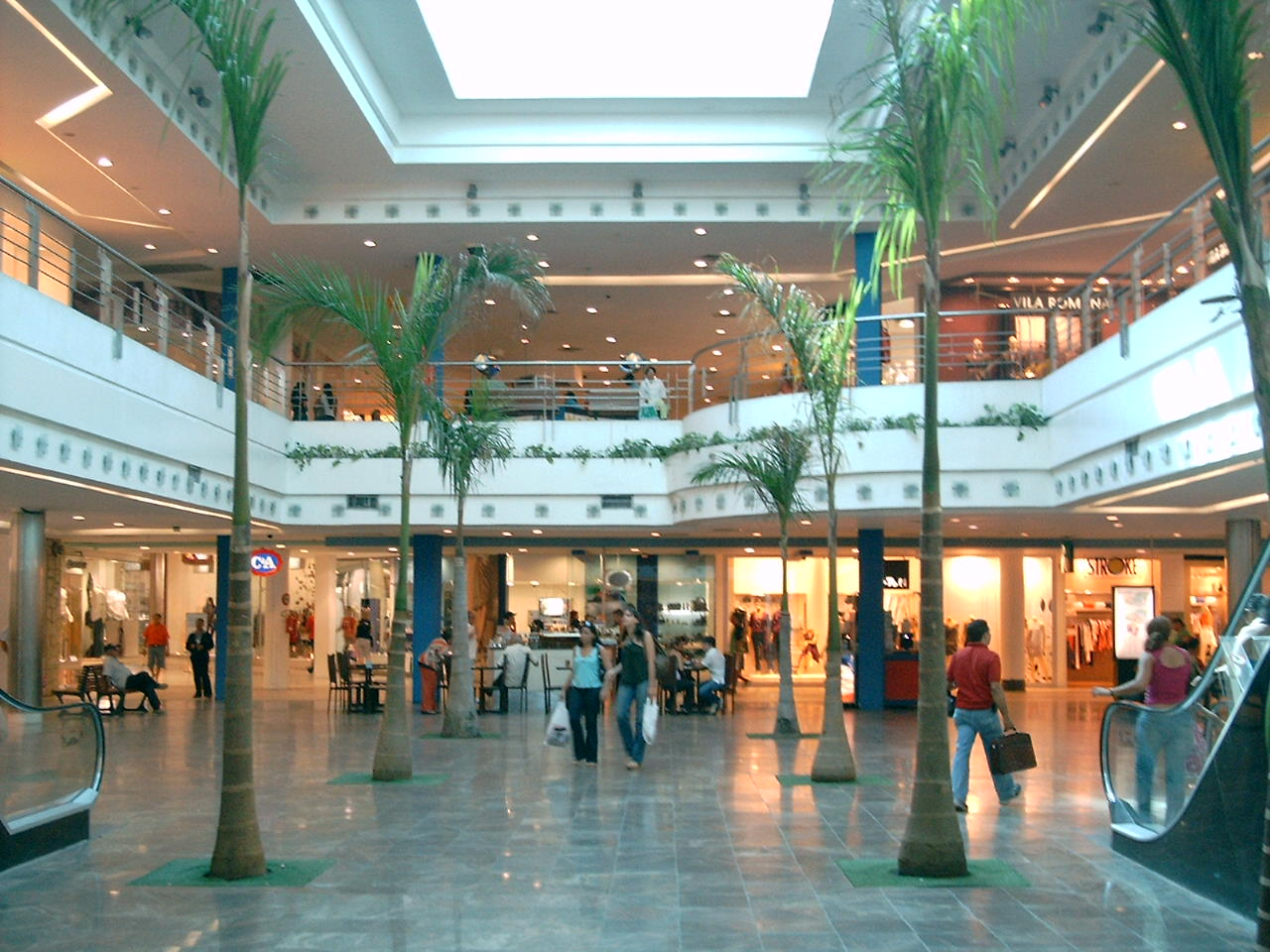 Foto por Dentro do Maraíra Shopping